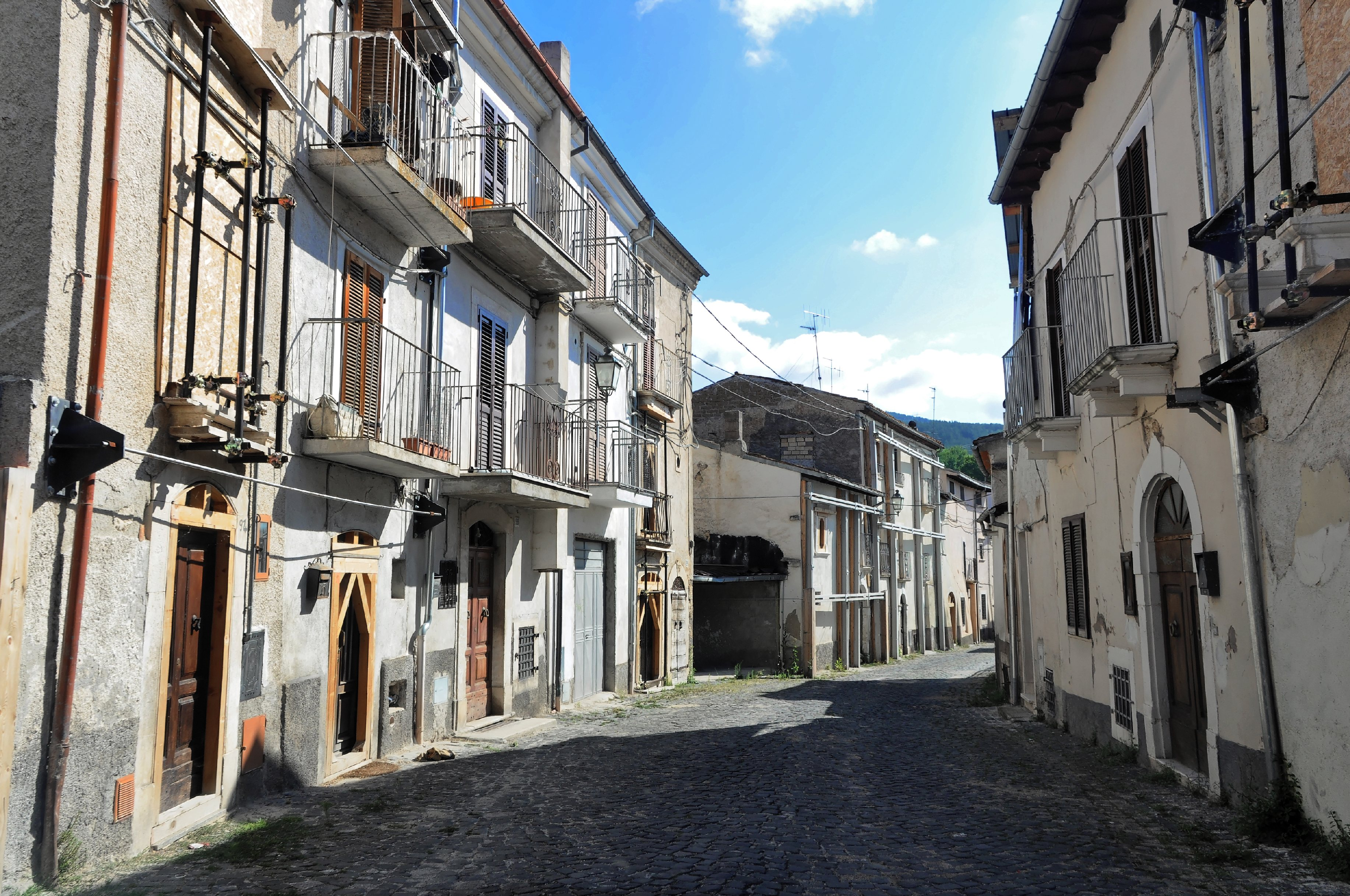 Poggio Picenze 2017